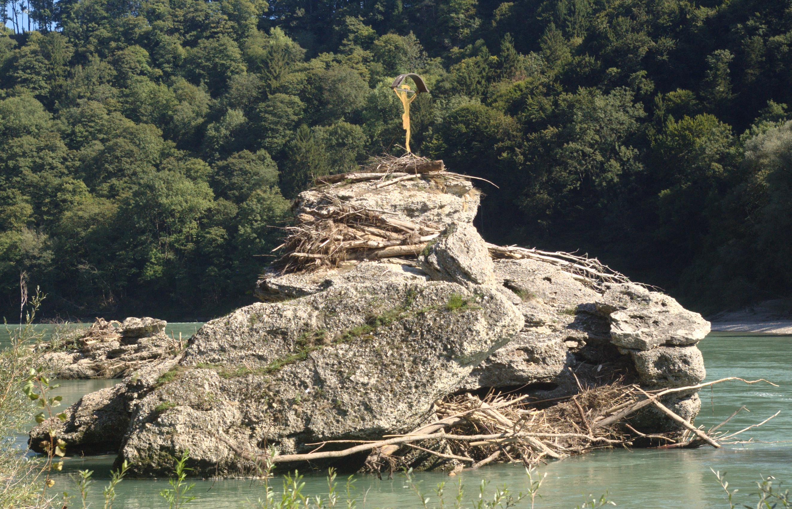 Kreuzfelsen mit KreuzThis is a photograph of an architectural monument.